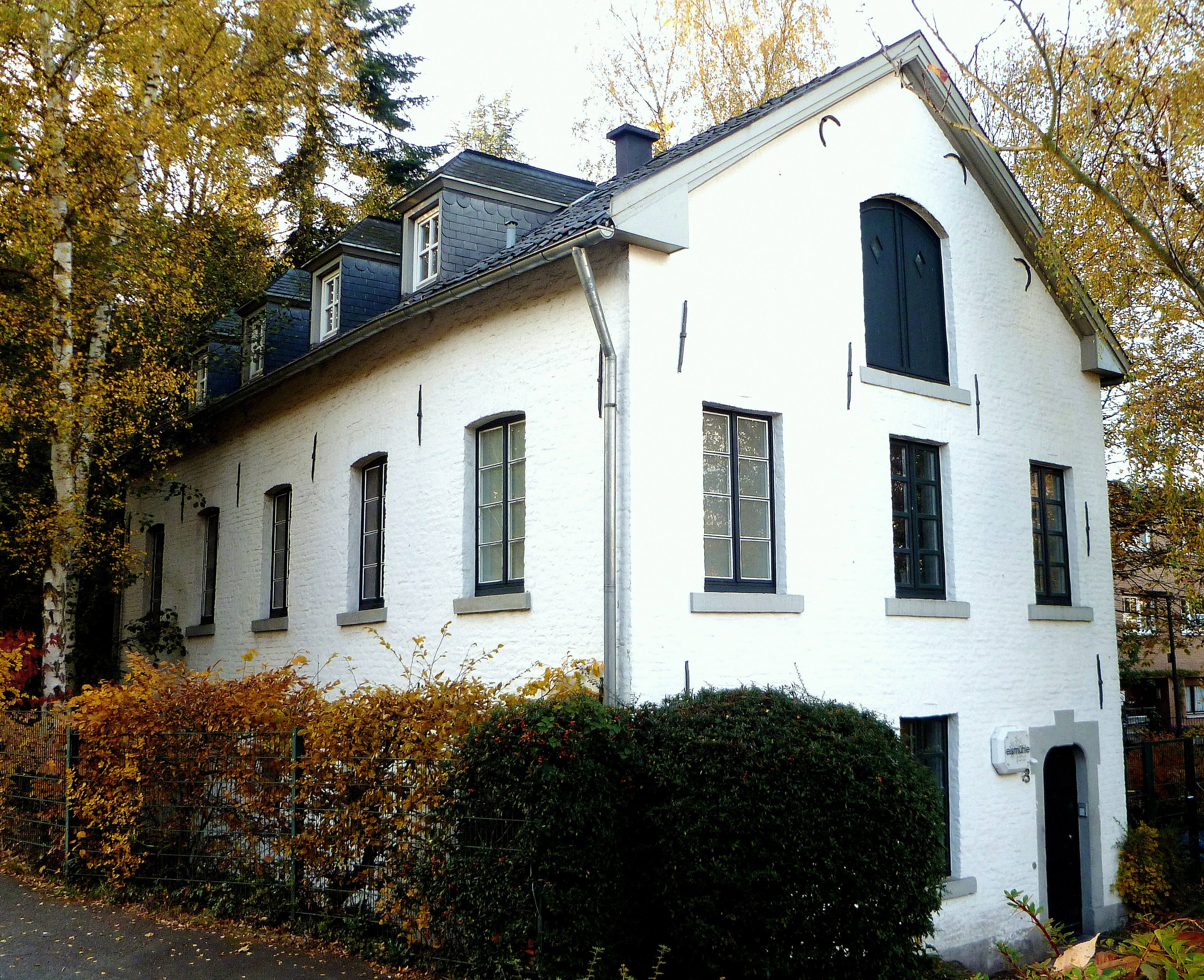 Baudenkmal in Aachen